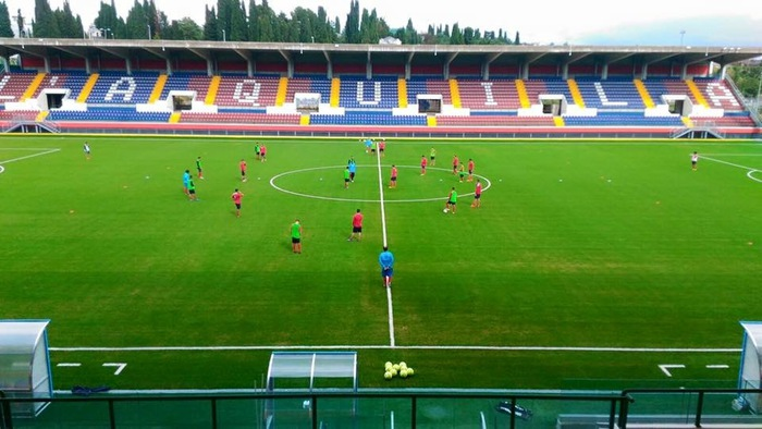 La squadra de L'Aquila Calcio 1927 durante un allenamento sul sintetico del nuovo impianto